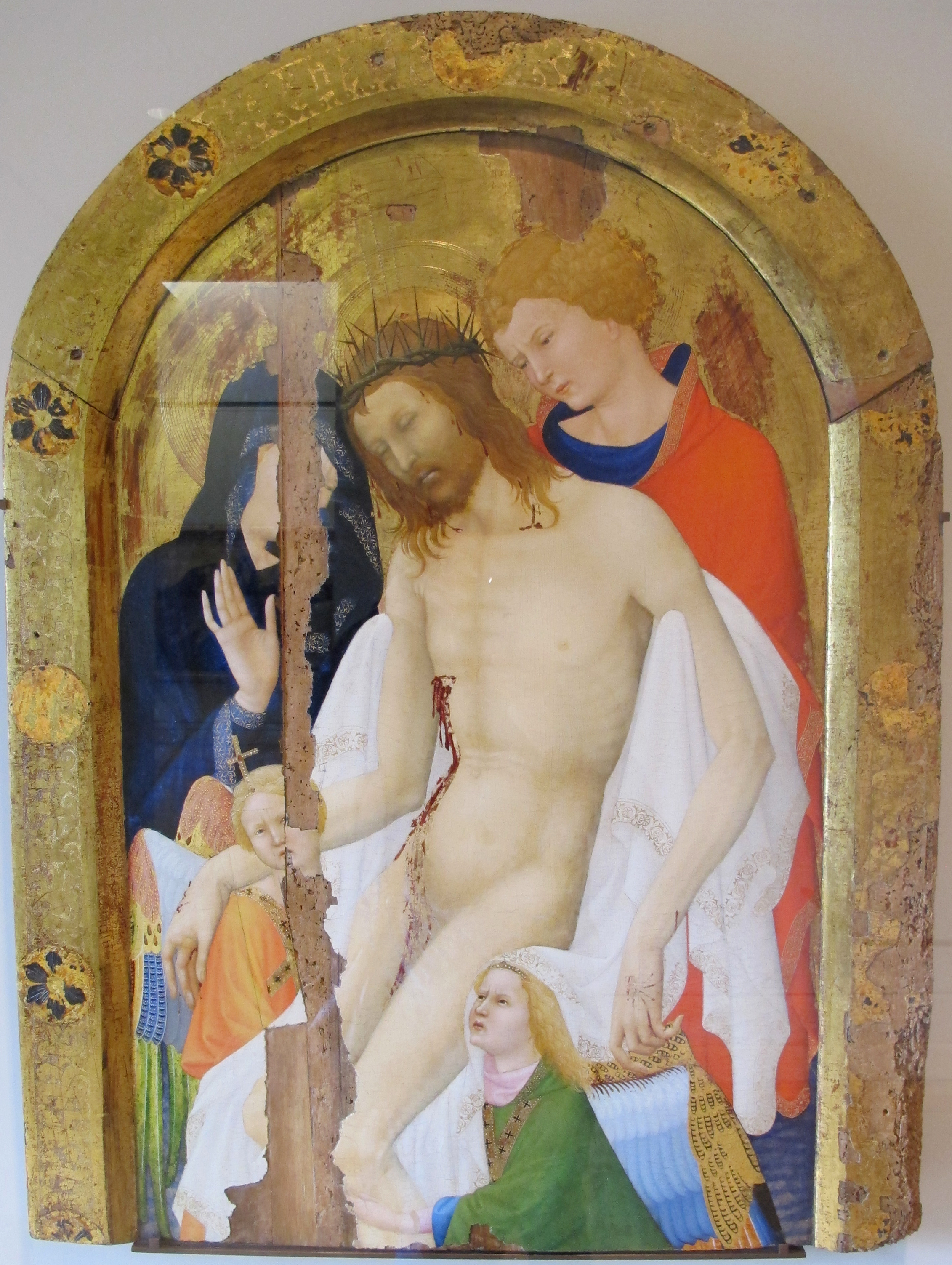 Dipinti francesi nel Louvre, Parigi, secc. XIV-XV